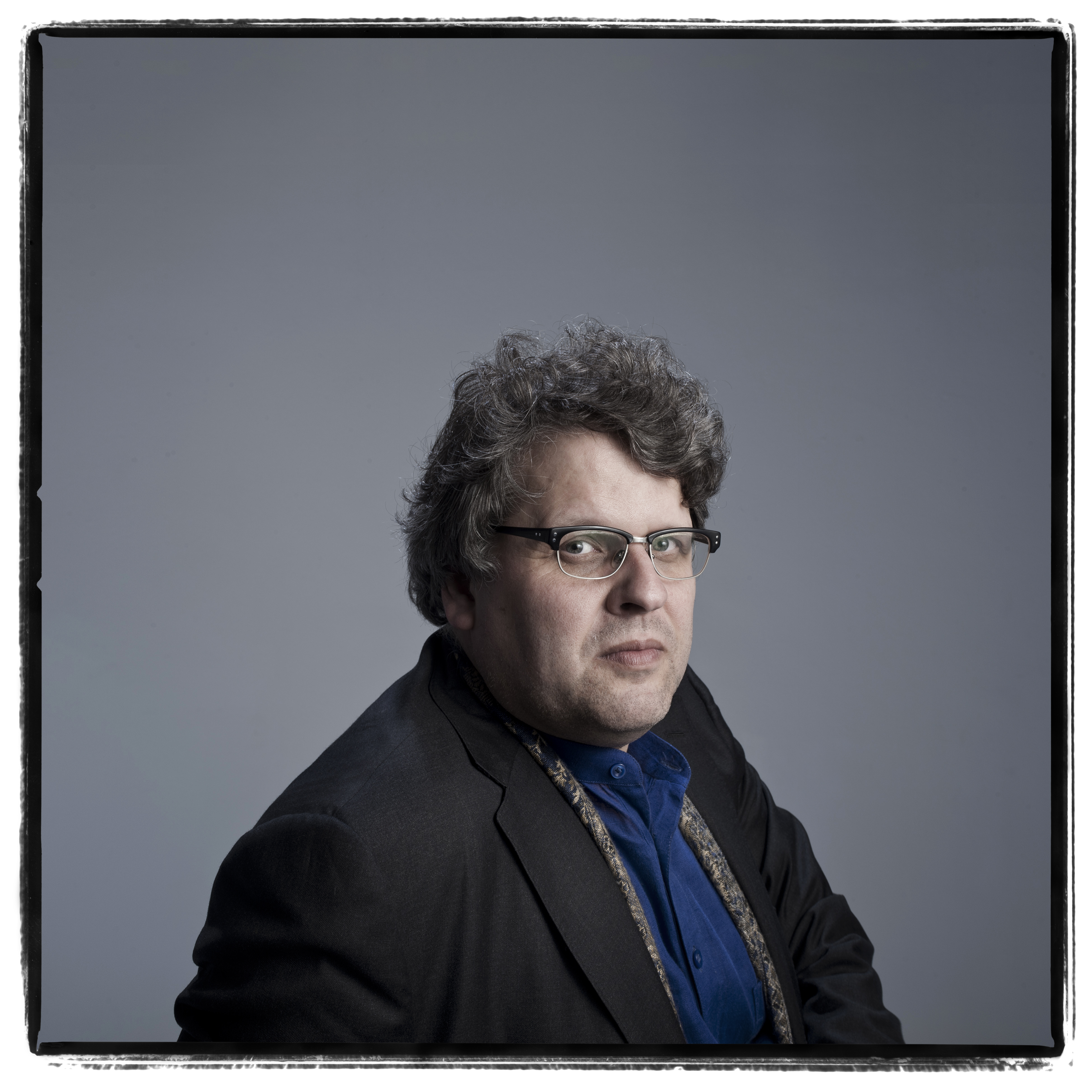 Peter W. Marx - Foto: (c) Hermann und Clärchen Baus; 2017